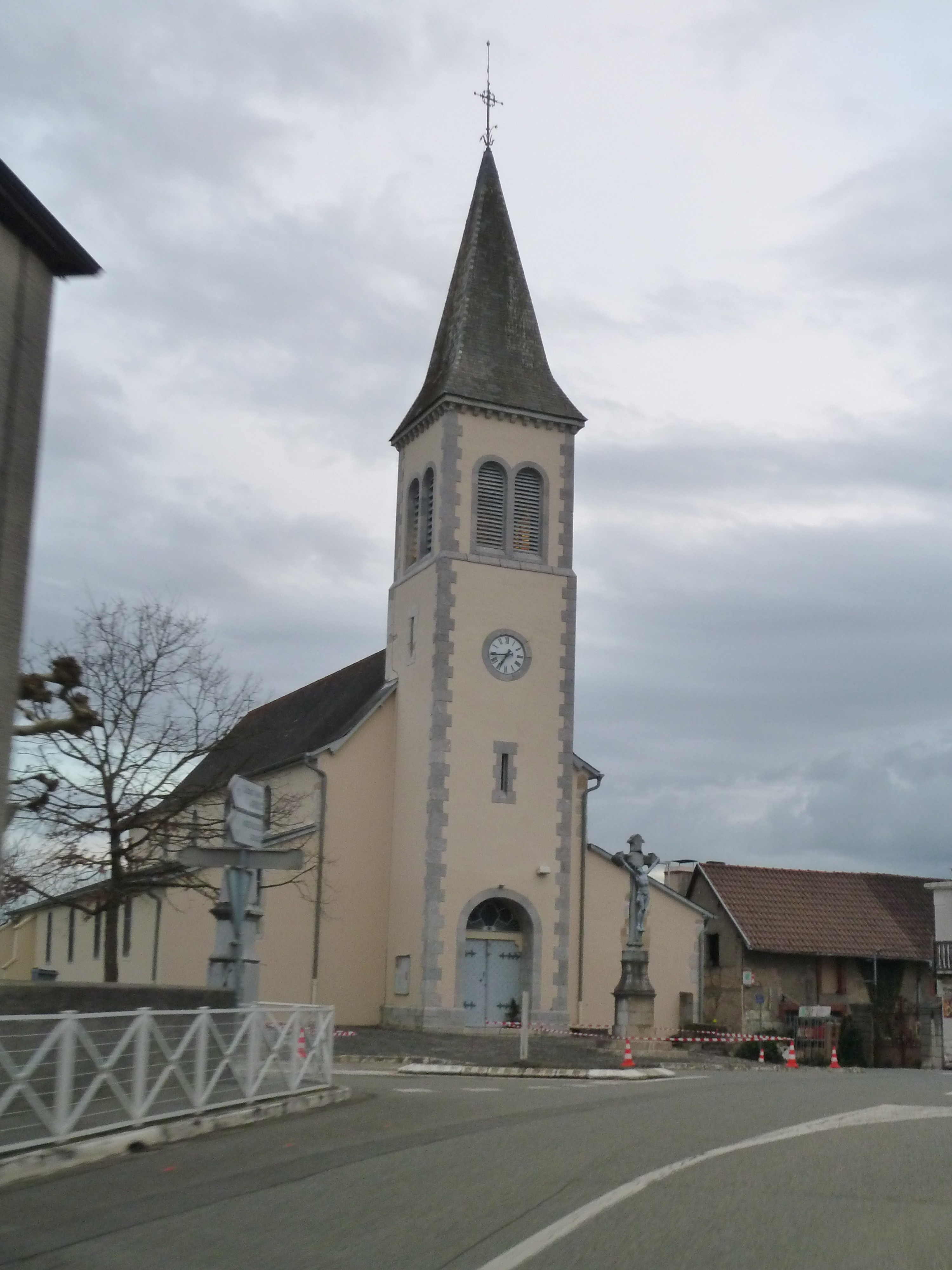 Cescau (Pyrénées-Atlantiques)